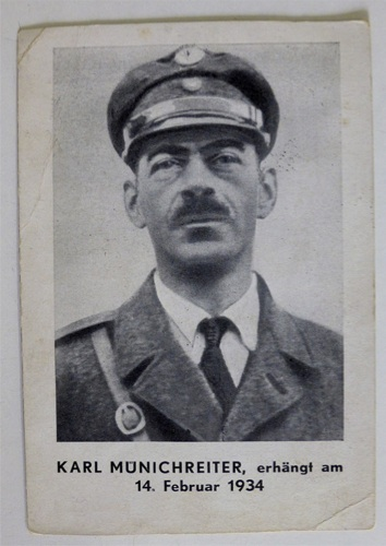 Abbildung von Karl Münichreiter